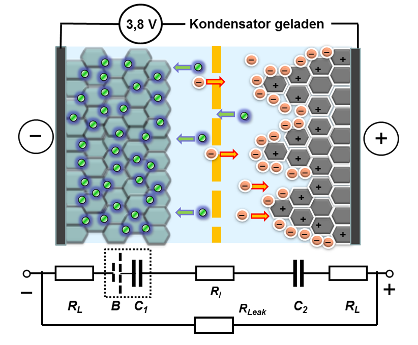 Schnitt durch eine kapazitive Zelle eines Lithium-Ionen-kondensators im geladenen Zustand